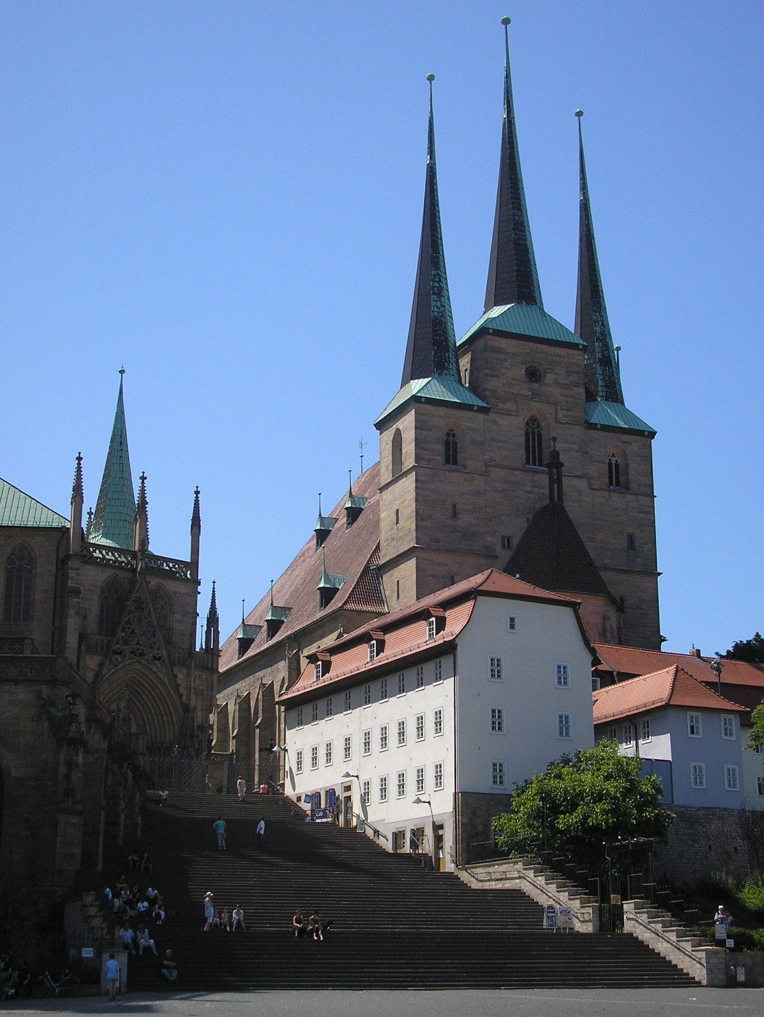 Die Severikirche und die Domstufen in Erfurt.